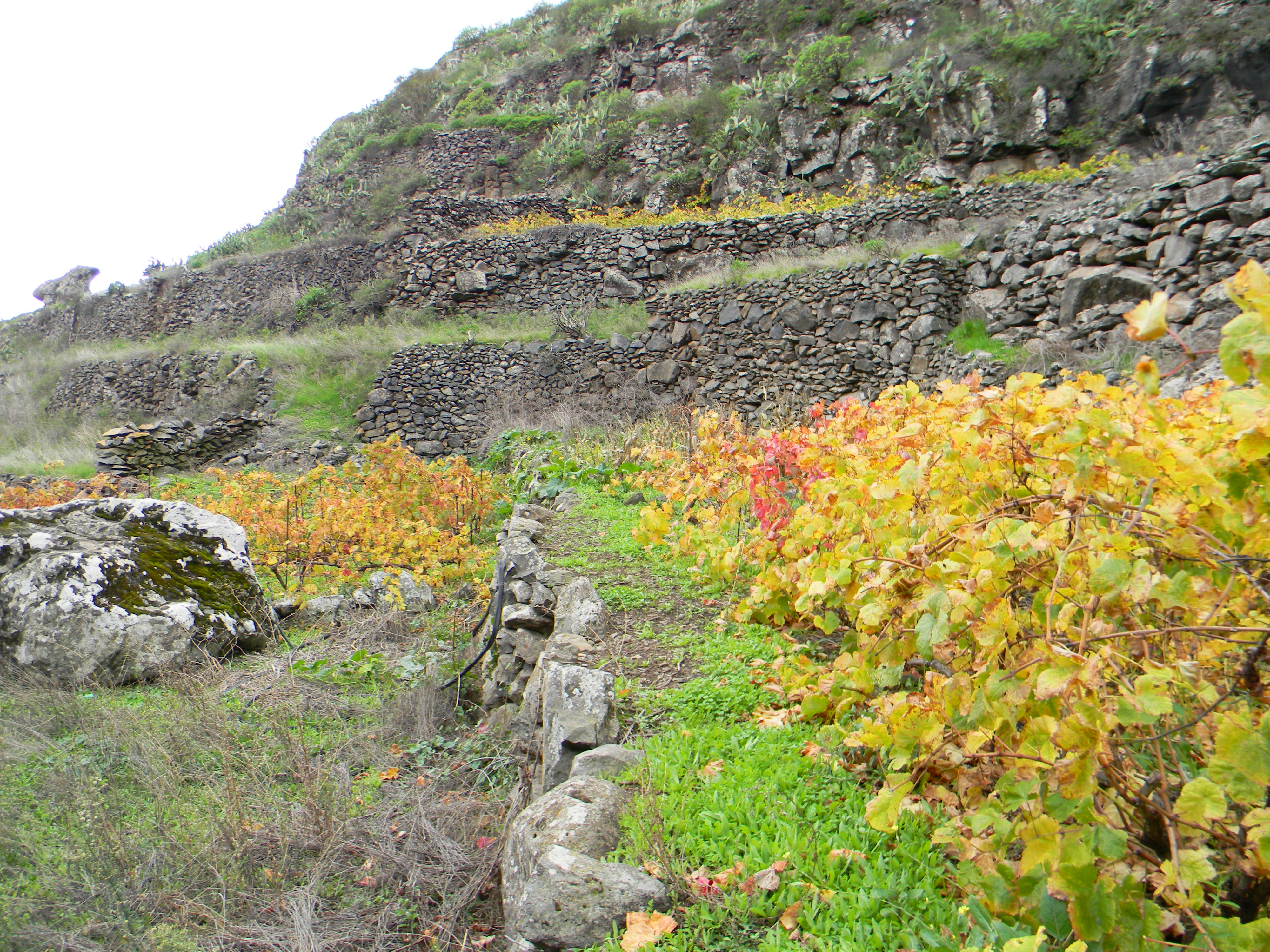 Weinanbau auf Terrassen mit typischen Trockenmauern auf La Gomera